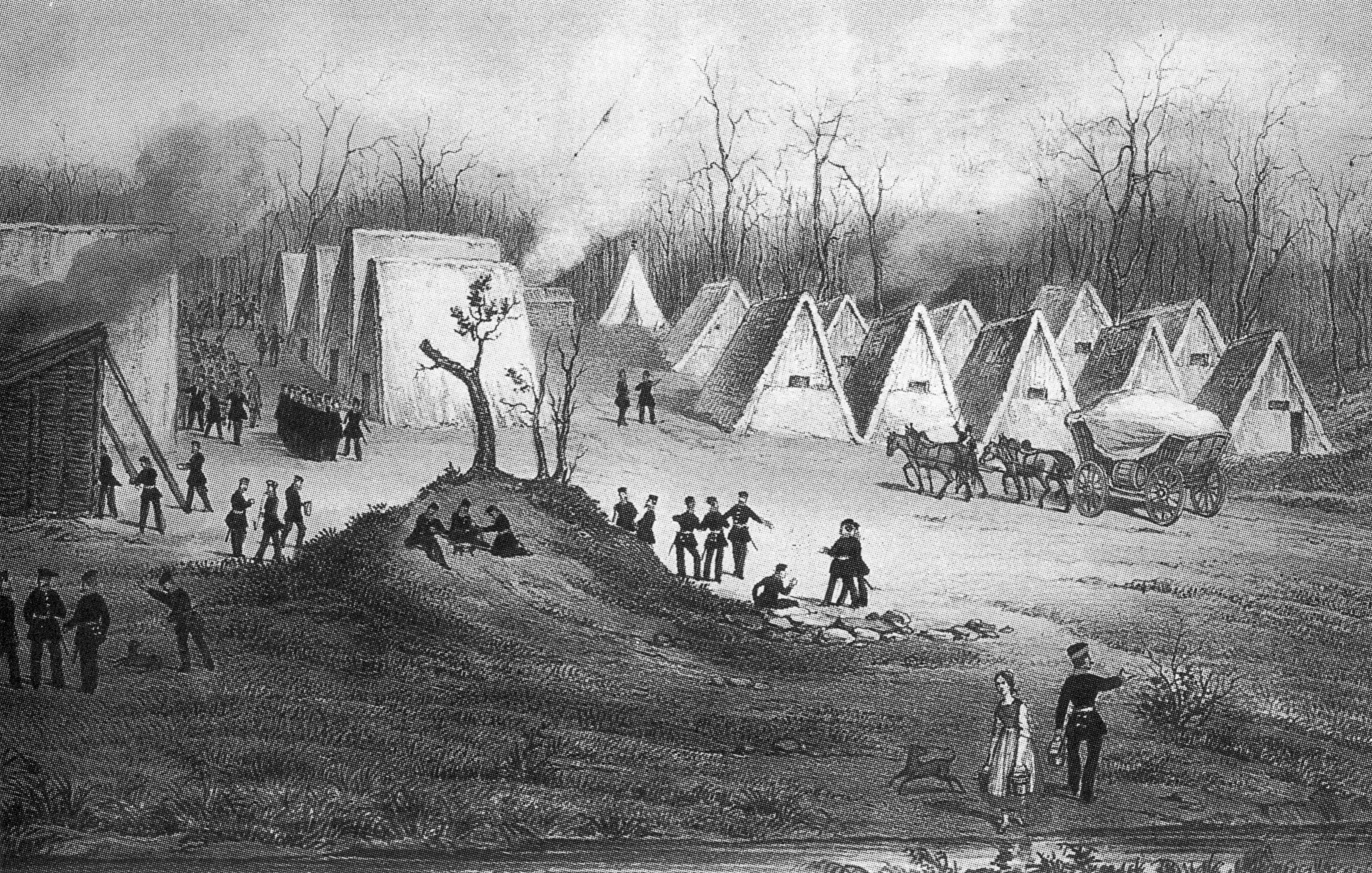 Lithographie nach einer Zeichnung von H. Koch, 1850. Lager der Schleswig-holsteinischen Armee in Stentenmühle bei Rendsburg.